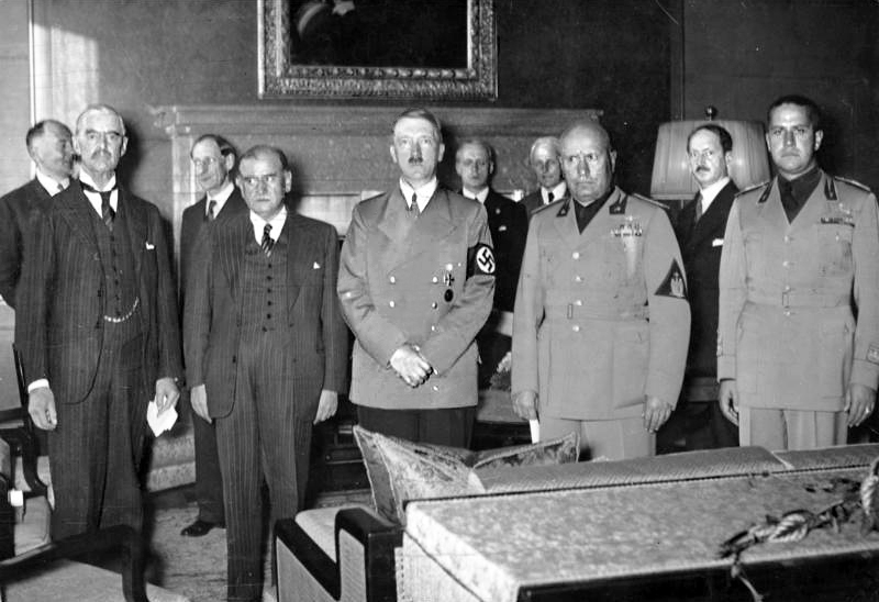 Münchener Abkommen, Staatschefs Zentralbild Das Münchner Abkommen vom 29.9.1938. Das am 29.9.1938 in München zwischen dem britischen Ministerpräsidenten Neville Chamberlain, dem französischen Ministerpräsidenten Edouard Daladier, dem italienischen Staatschef Benito Mussolini und Adolf Hitler geschlossene Abkommen ermächtigte das faschistische Deutschland zur Annexion tschechoslowakischen Gebietes. UBz: von links: Chamberlain, Daladier, Hitler, Mussolini, und der italienische Außenminister Graf Galeazzo Ciano. Im Hintergrund v.l.n.r. Unbekannter (wahrscheinlich ein brite Diplomat), Fromageot, Ribbentrop, Weizsäcker, Leger alias Saint-John Perse. 12 766-38 [Scherl Bilderdienst] Abgebildete Personen: Neville Chamberlain, Premierminister, Großbritannien Graf Galeazzo Ciano, Außenminister, Italien (GND 119178362) Édouard Daladier, Ministerpräsident, Vorsitzender Sozialistische Partei, Frankreich Henri Fromageot, Diplomat, Frankreich Adolf Hitler, Reichskanzler, Deutschland Alexis Leger alias Saint-John Perse, Generalsekretär des Aussenministeriums, auch Dichter, Schriftsteller und Nobelpreisträger für Literatur, Frankreich Benito Mussolini, Ministerpräsident, Regierungschef, Chef des Faschistischen Großrates, Italien Joachim von Ribbentrop, deutscher Außenminister Freiherr Ernst von Weizsäcker, Diplomat, Staatssekretär im Auswärtigen Amt, SS-Führer, Deutschland Information added by Wikimedia users.